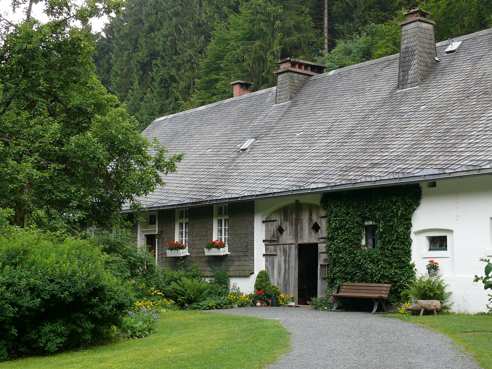 Altes Forsthaus Rehsiepen im Schmallenberger Sorpetal (Hochsauerland)